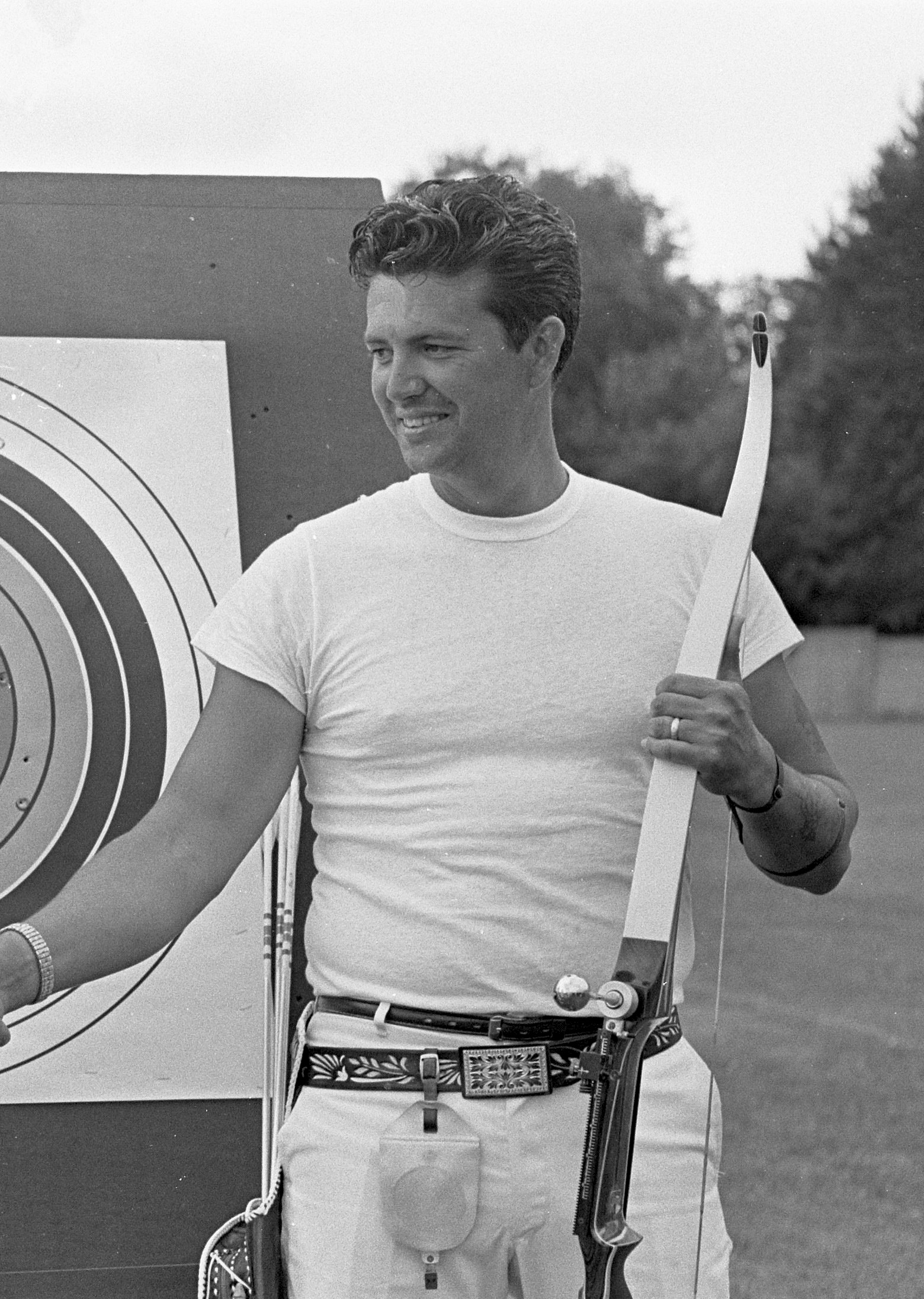 Wereldkampioenschappen Boogschieten te Amersfoort. Ray Rogers